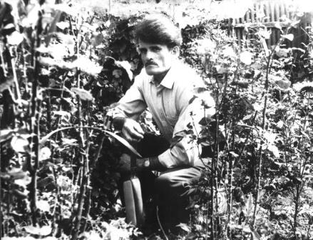 Поет-пісняр